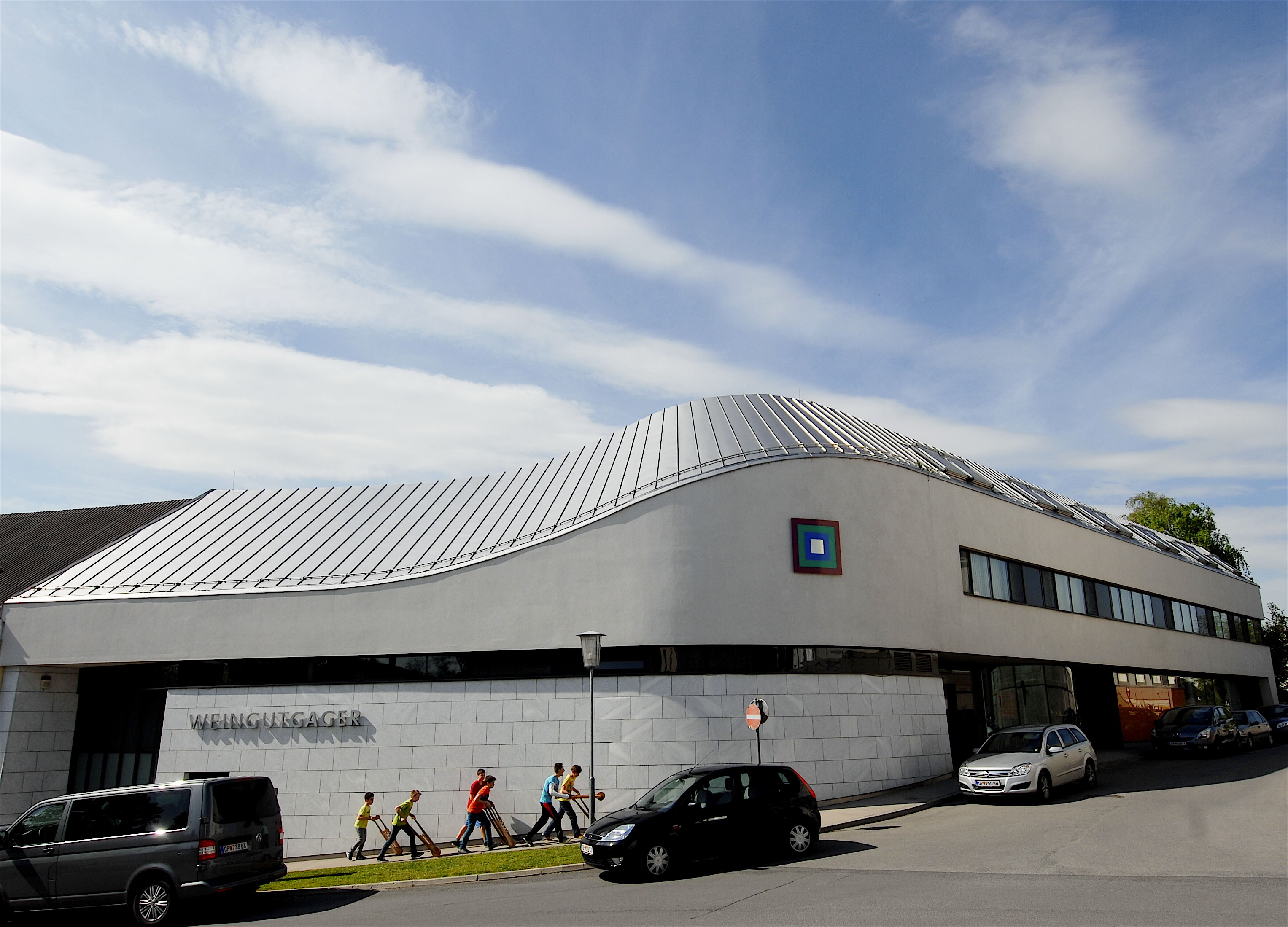 Ratschenbuben vor dem Weingut Gager in Deutschkreutz, 18. April 2014